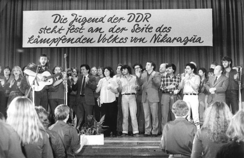 ADN-ZB-Zimmermann-30.3.1983-hü-Berlin: Solidaritätsmeeting-Ihre feste Verbundenheit mit dem Volk von Nikaraguea bekundeten Jugendliche während des Meetings im Klubhaus des Werkes für Fernsehelektronik. Herzlich begrüßte Ehrengäste waren Eberhard Aurich (4.v.r.), 2. Sekretär des FDJ-Zentralrates, und Emilio Moreno Gutierrez (7.v.r.), Botschafter der Republik Nikaragua in der DDR.